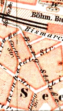 Ausschnitt aus unten angegebener Quelle